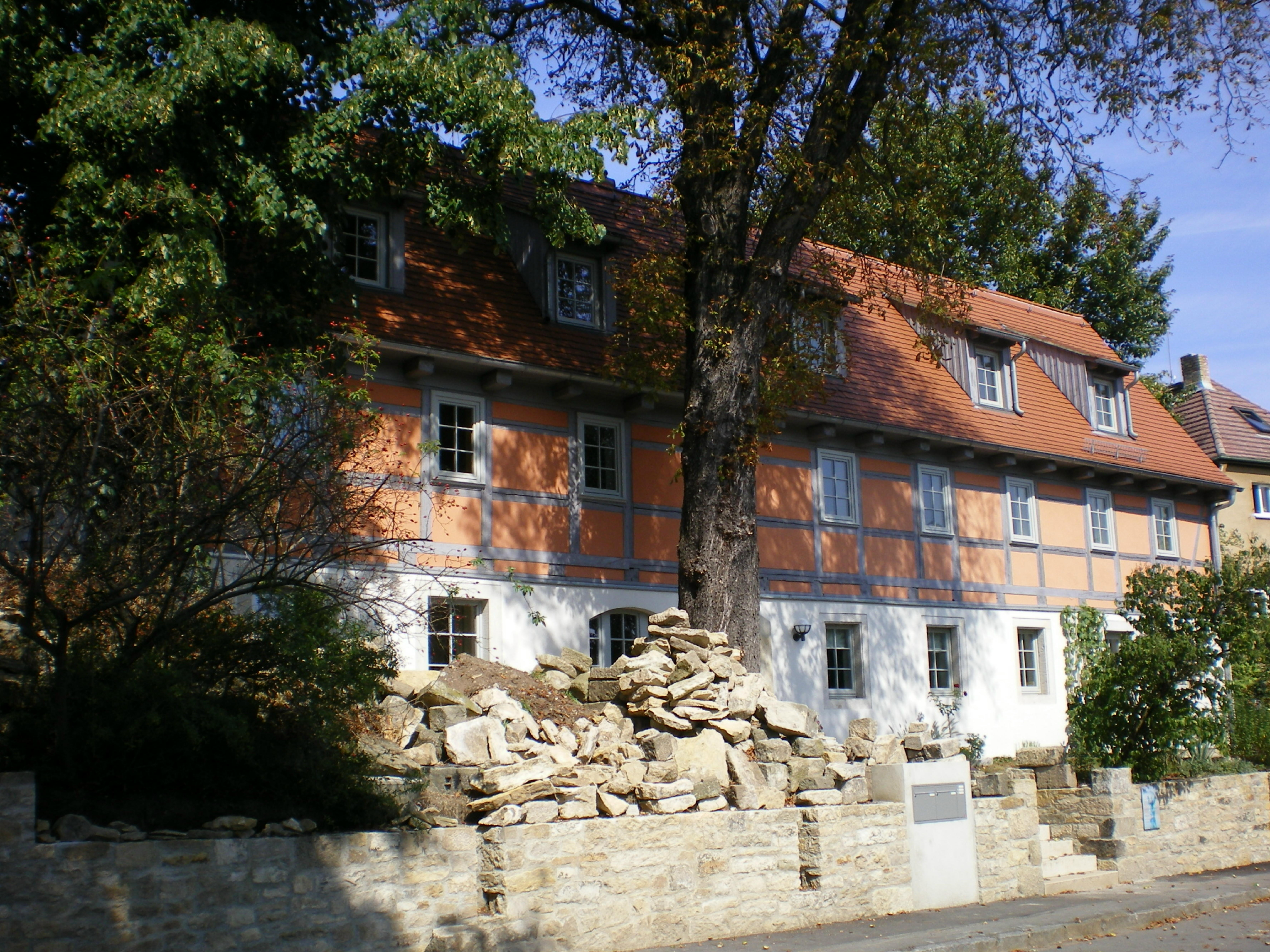 Dresden Eigenheimstraße 1, ehemalige Moreauschänke